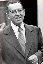 Josafat Roel Pineda